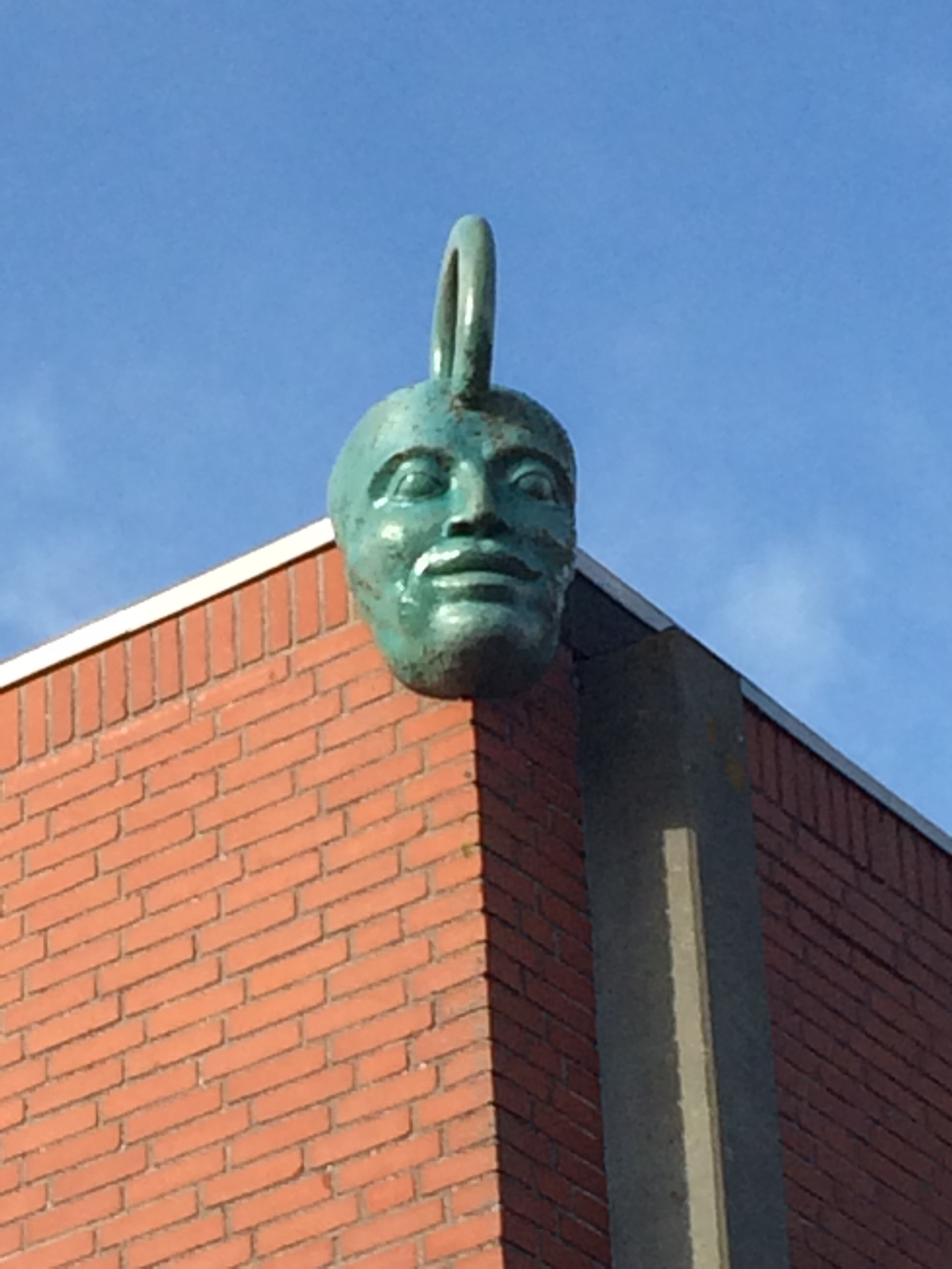 Fantasy head facing southeast on Tallerup school sports gym